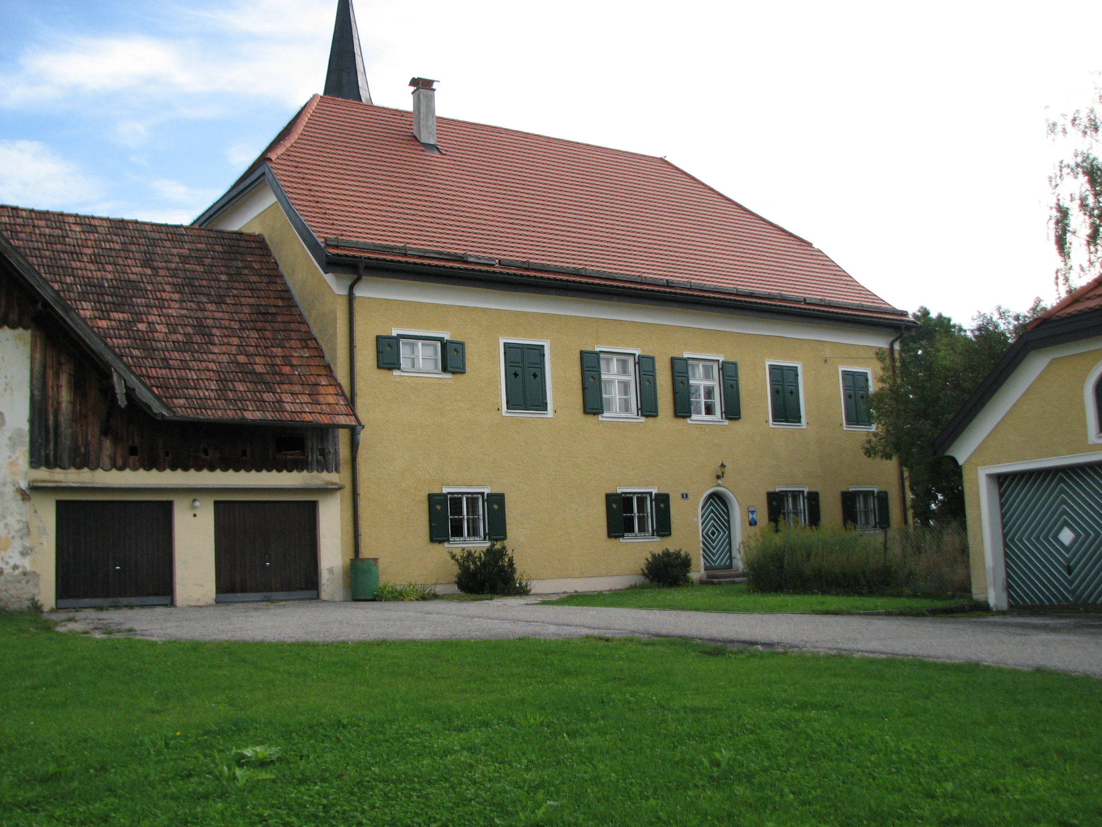 Pfarrhof (mit Wirtschaftsgebäuden), Perwang am Grabensee